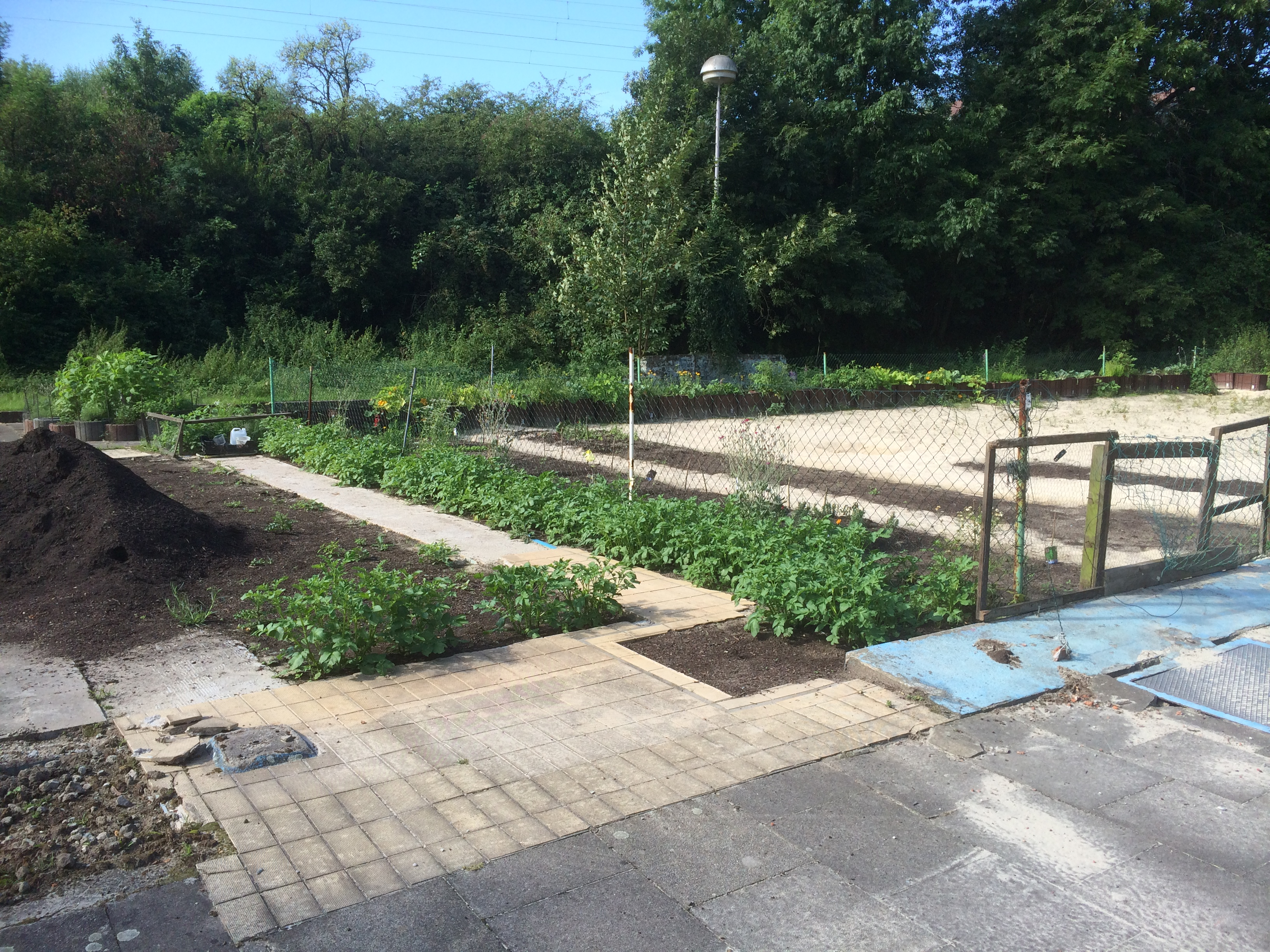 Das ehemalige Freibad Schallacker; zur Zeit genutzt für ein Projekt als Gemeinschaftsgarten